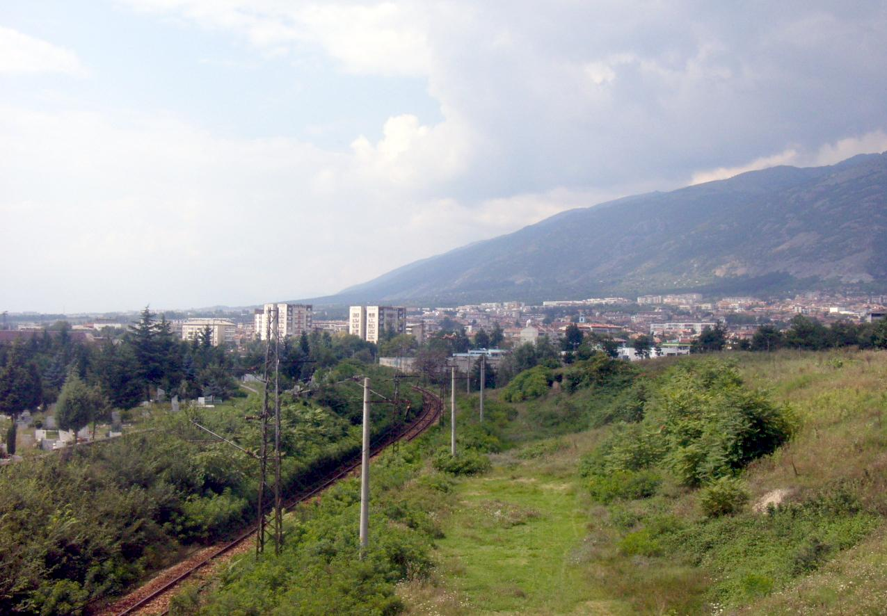 Karlovo, totala vido de sud-oriento (2005)